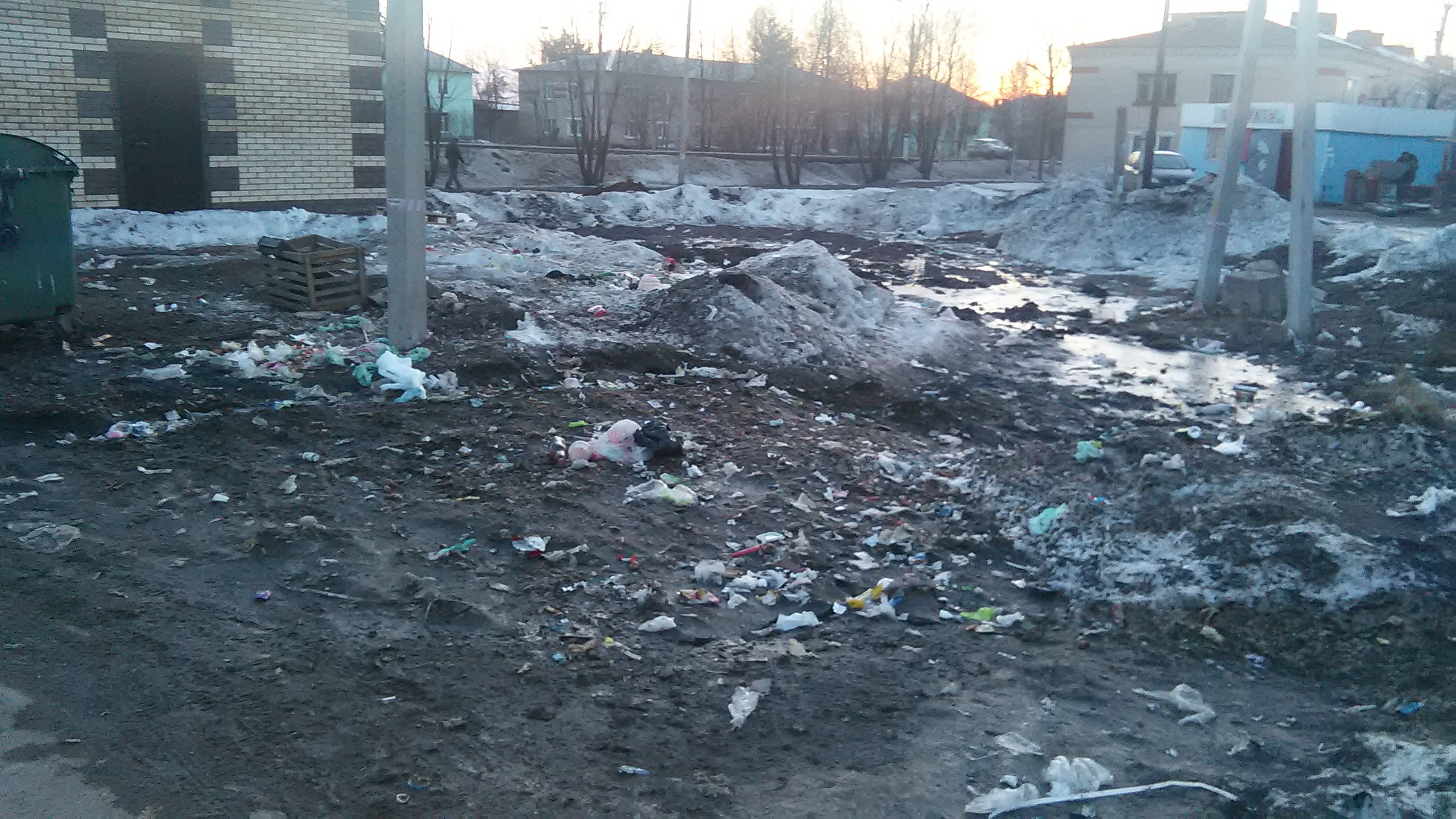 Вид на овраг на ул. Пархоменко 2 — Шахунья